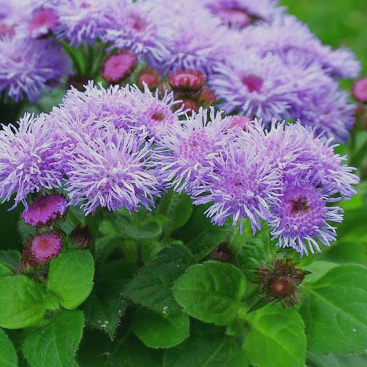 Ageratum haustonianum